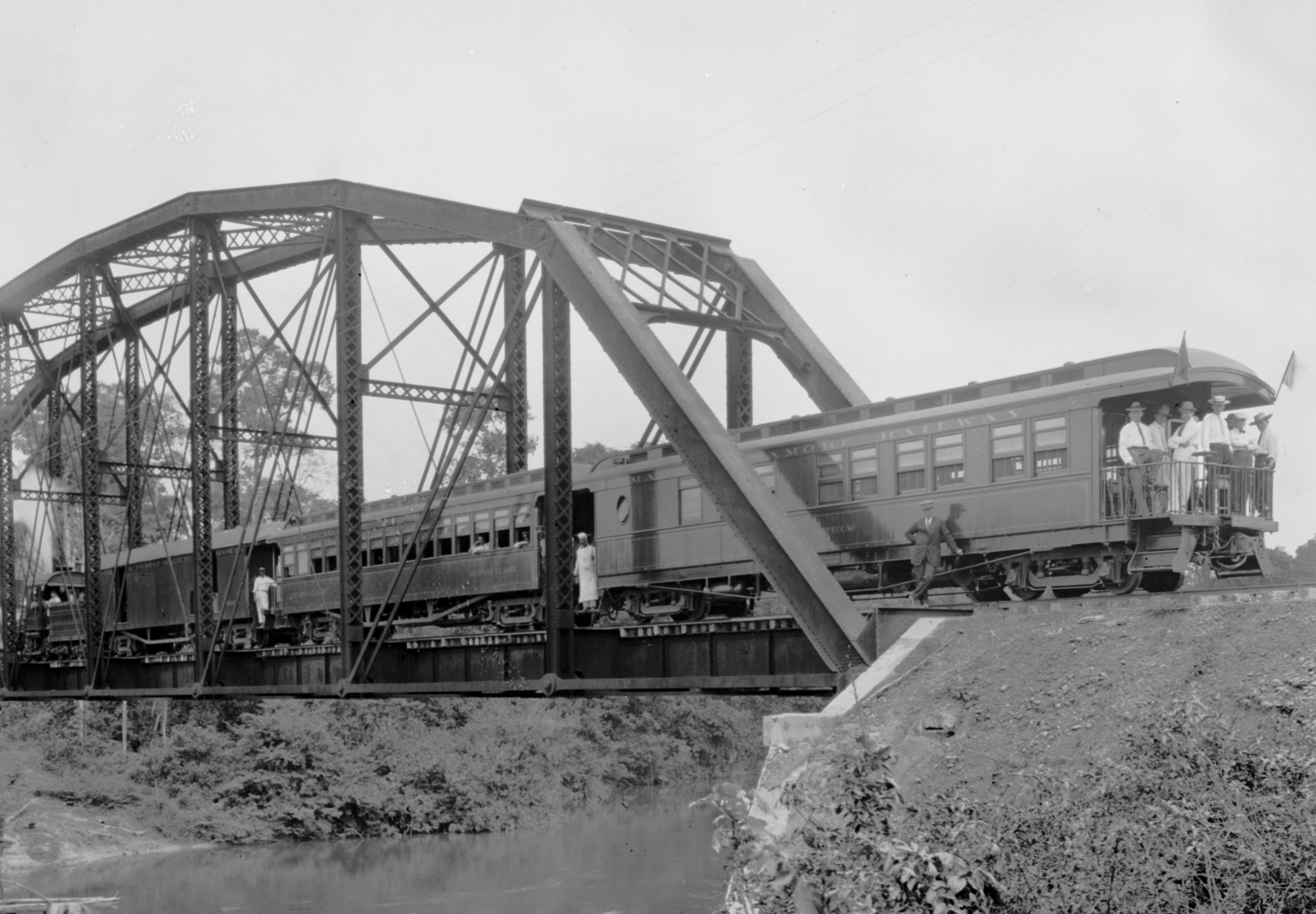 Obra que integra o acervo do Museu Paulista da USP. Coleção Dana Merrill.